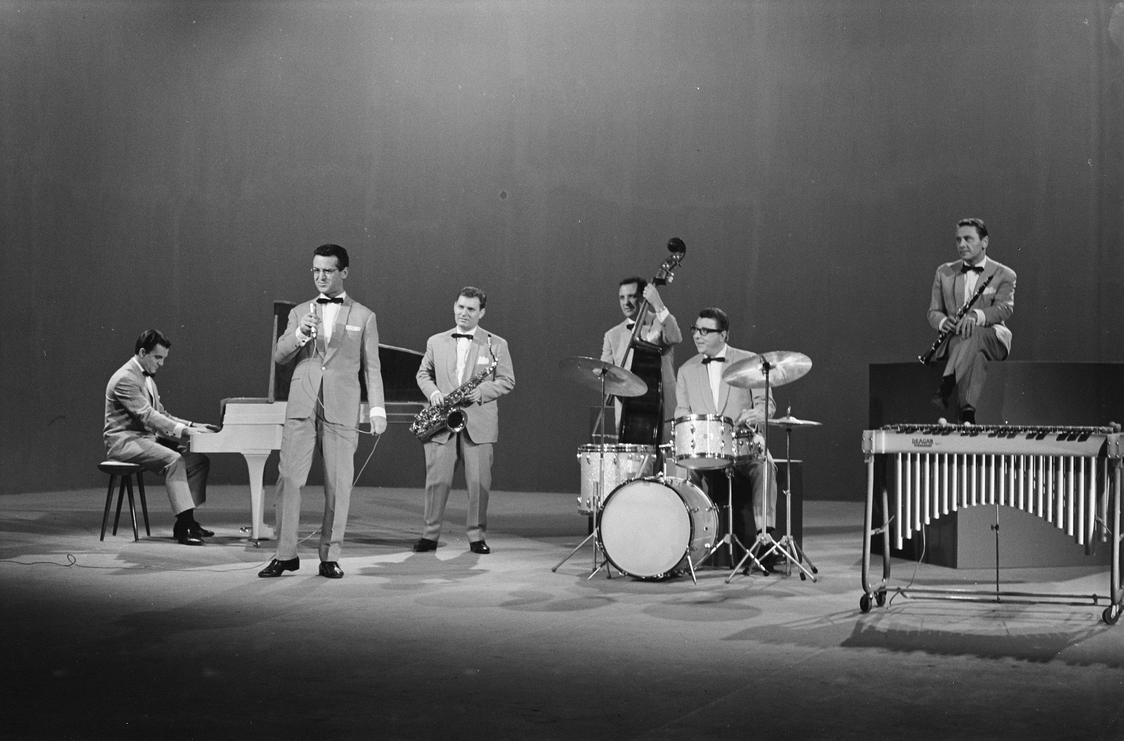 Das Hazy-Osterwald-Sextett bei Aufnahmen in den Cinetone Studios in Amsterdam